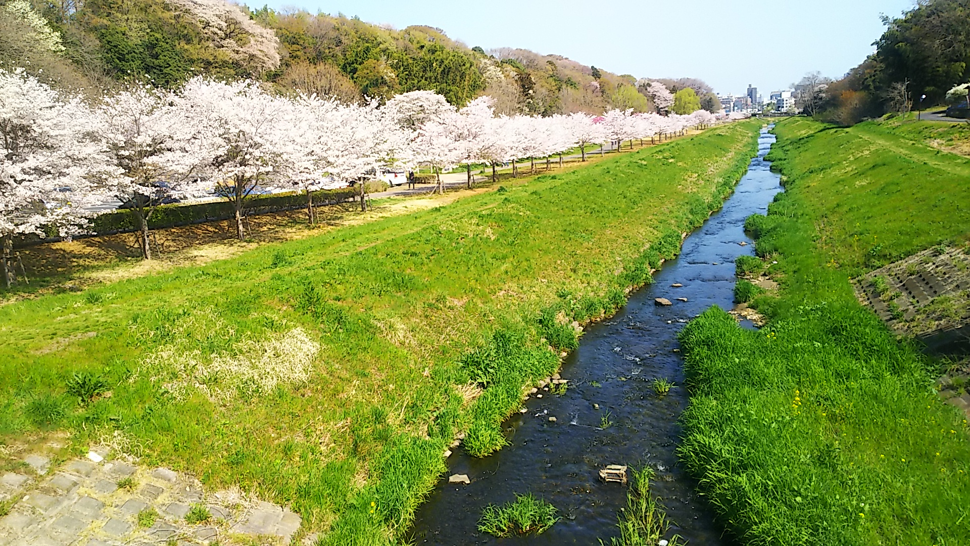 茨城県水戸市を流れる逆川、及び逆川緑地。 小門橋から下流